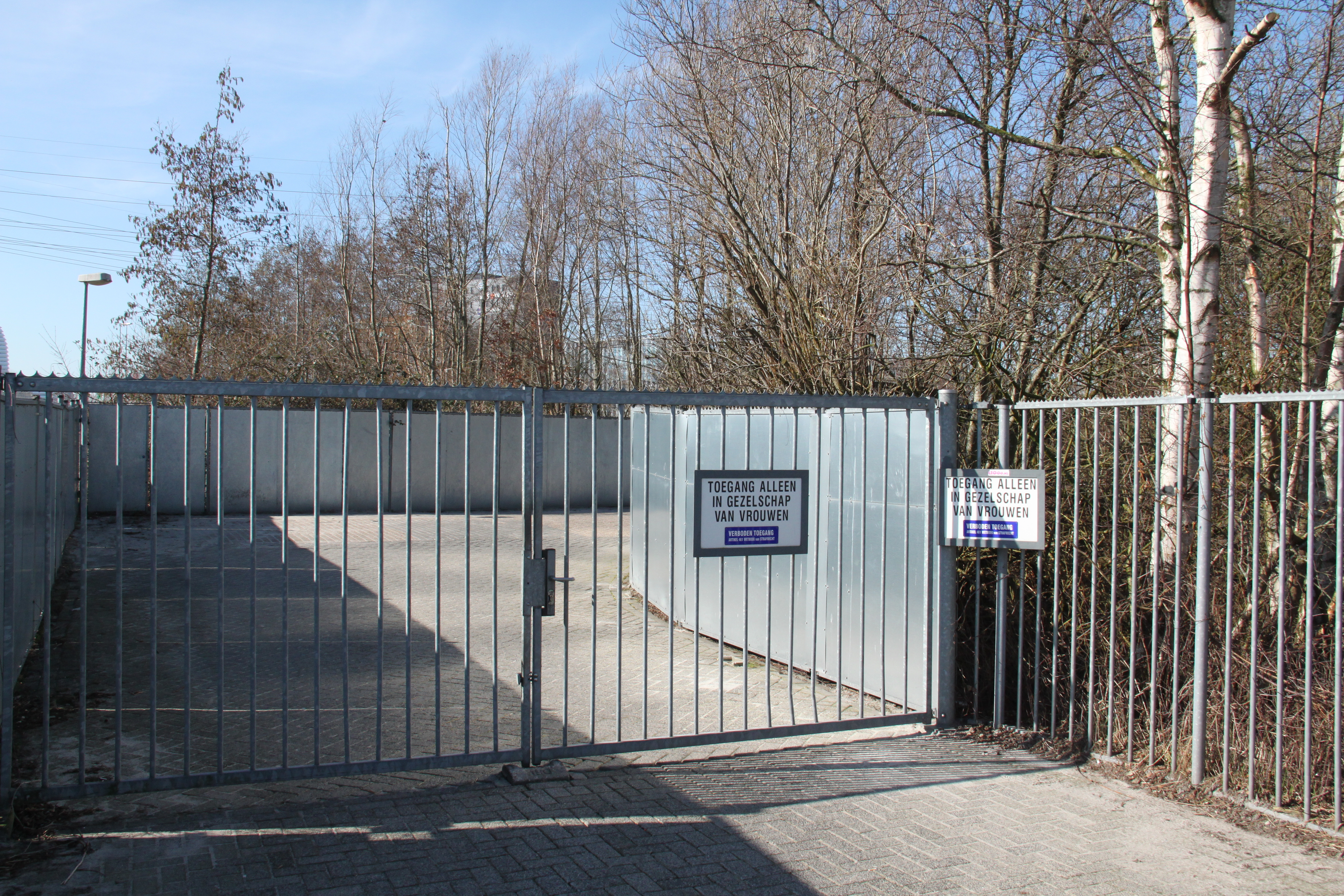 Zicht op de afwerkplek van de Groninger tippelzone aan de Bornholmstraat.